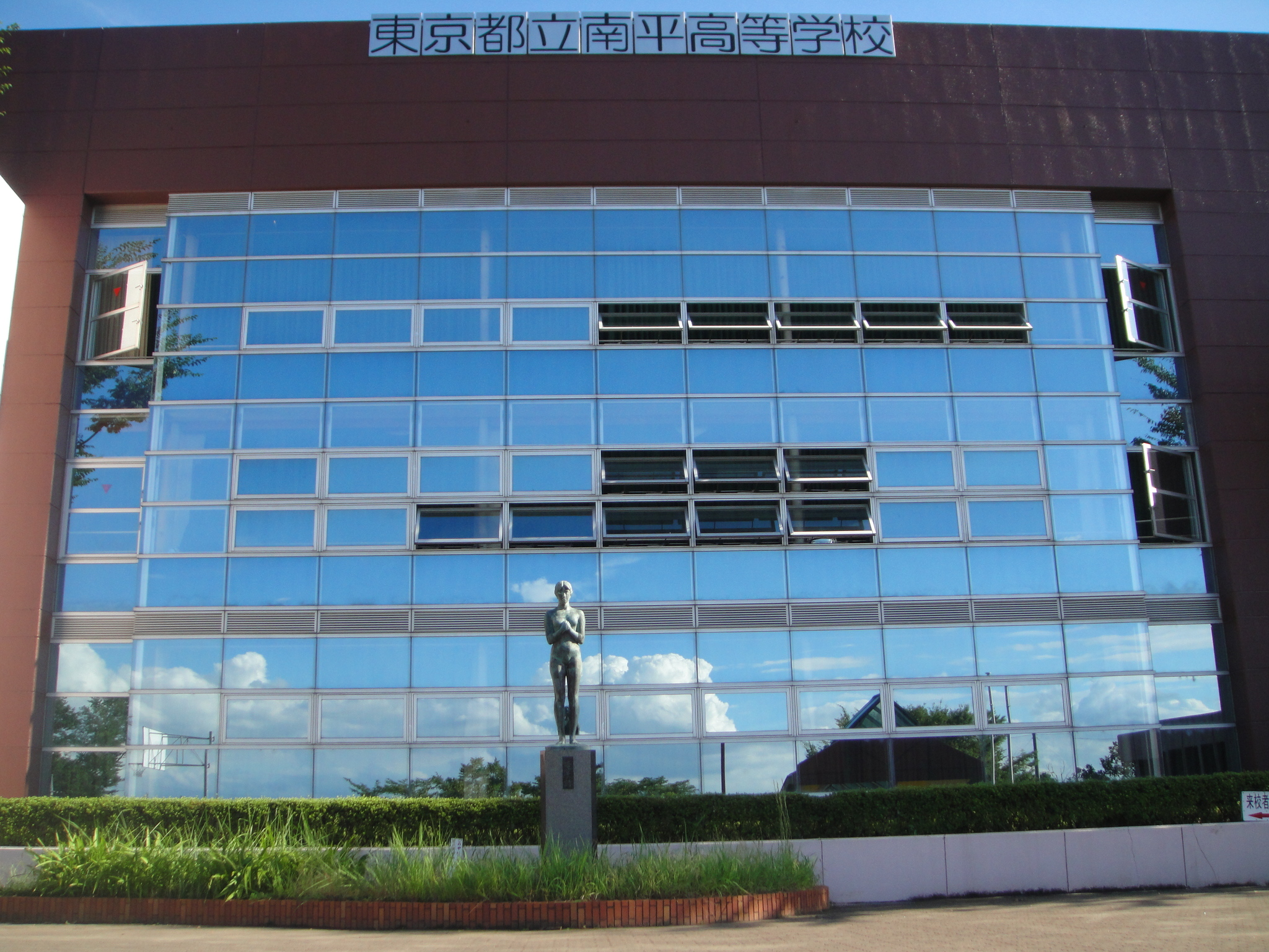 南平高校の格技棟（体育館）と若草の詩の像